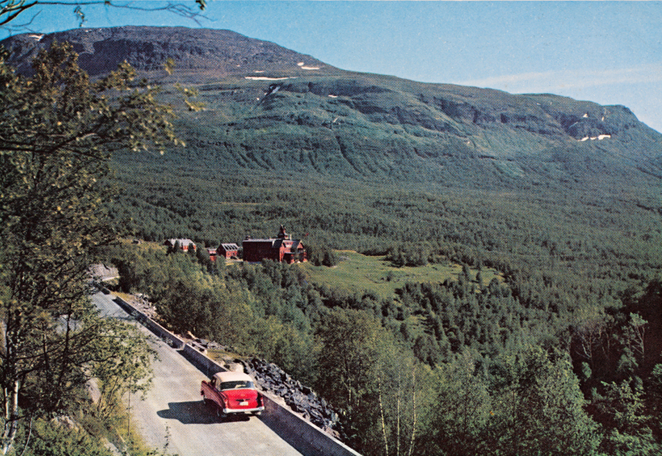 Tittel / Title: Norge: Maristuen Høyfjellshotell, Filefjell, 830 m. o. h. Ruten Fagernes - Lærdal, Sogn Motiv / Motif: Postkort. Den røde og hvite bilen tilhørte postkortforlaget. Nr. 785 (produksjonsnr fra Normann) Dato / Date: utgitt på slutten av 1960-tallet Fotograf / Photographer: Normann Sted / Place: Sogn og Fjordane Eier / Owner Institution: Nasjonalbiblioteket / National Library of Norway Lenke / Link: Bildesignatur / Image Number: blds_02243